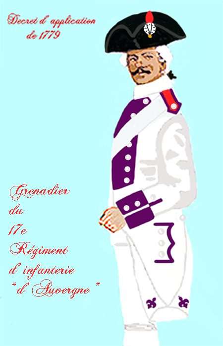 Uniform of a royal french infantry regiment from 1779 . Taken from: „LES UNIFORMES ET LES DRAPEAUX DE L'ARMÉE DU ROI“ Marseille 1899.